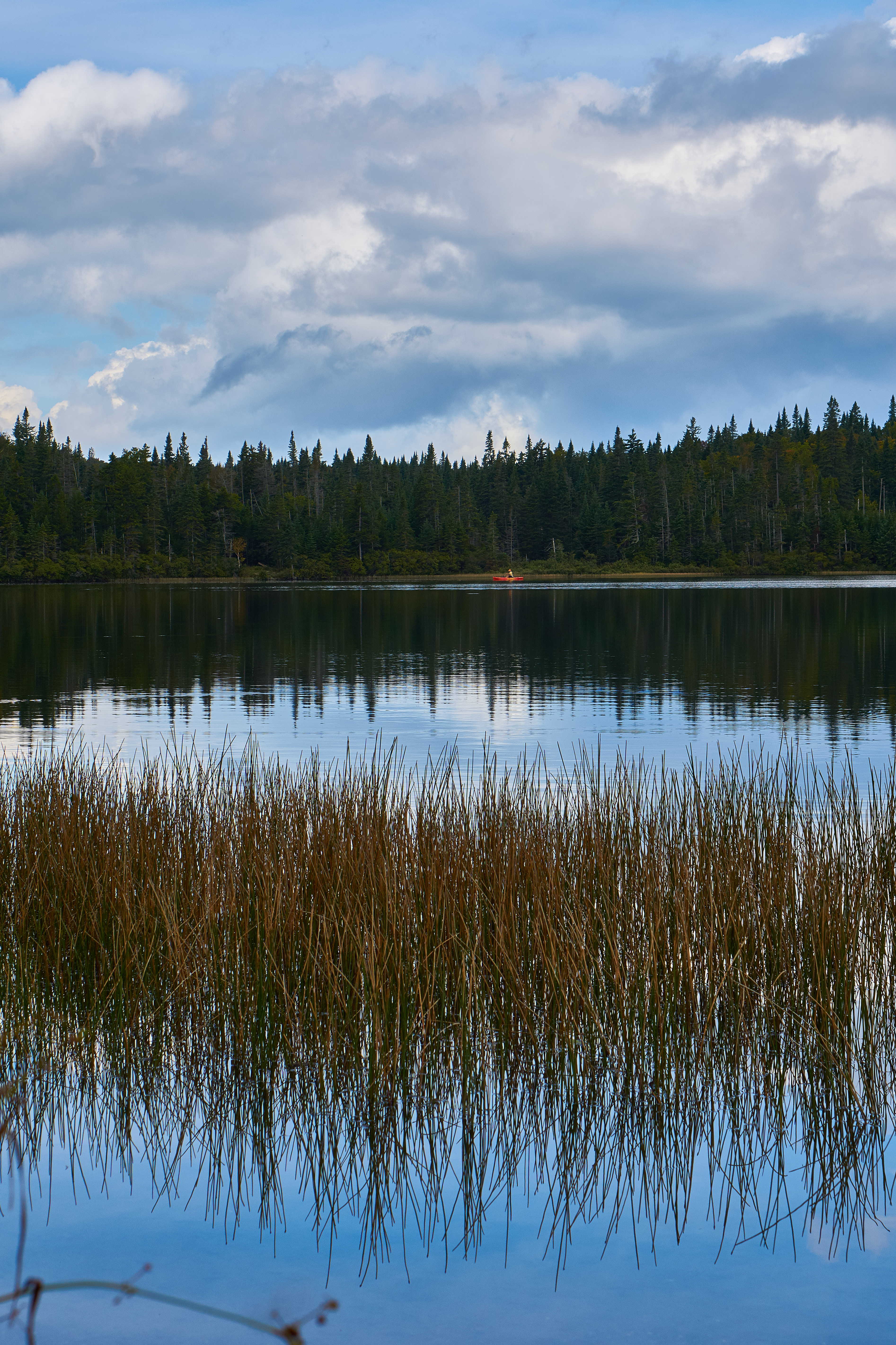 colemanSPDSC05579